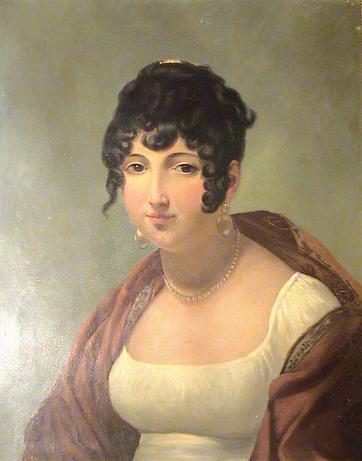 Gabrielle Boigues